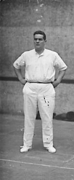 Atano II in 1927